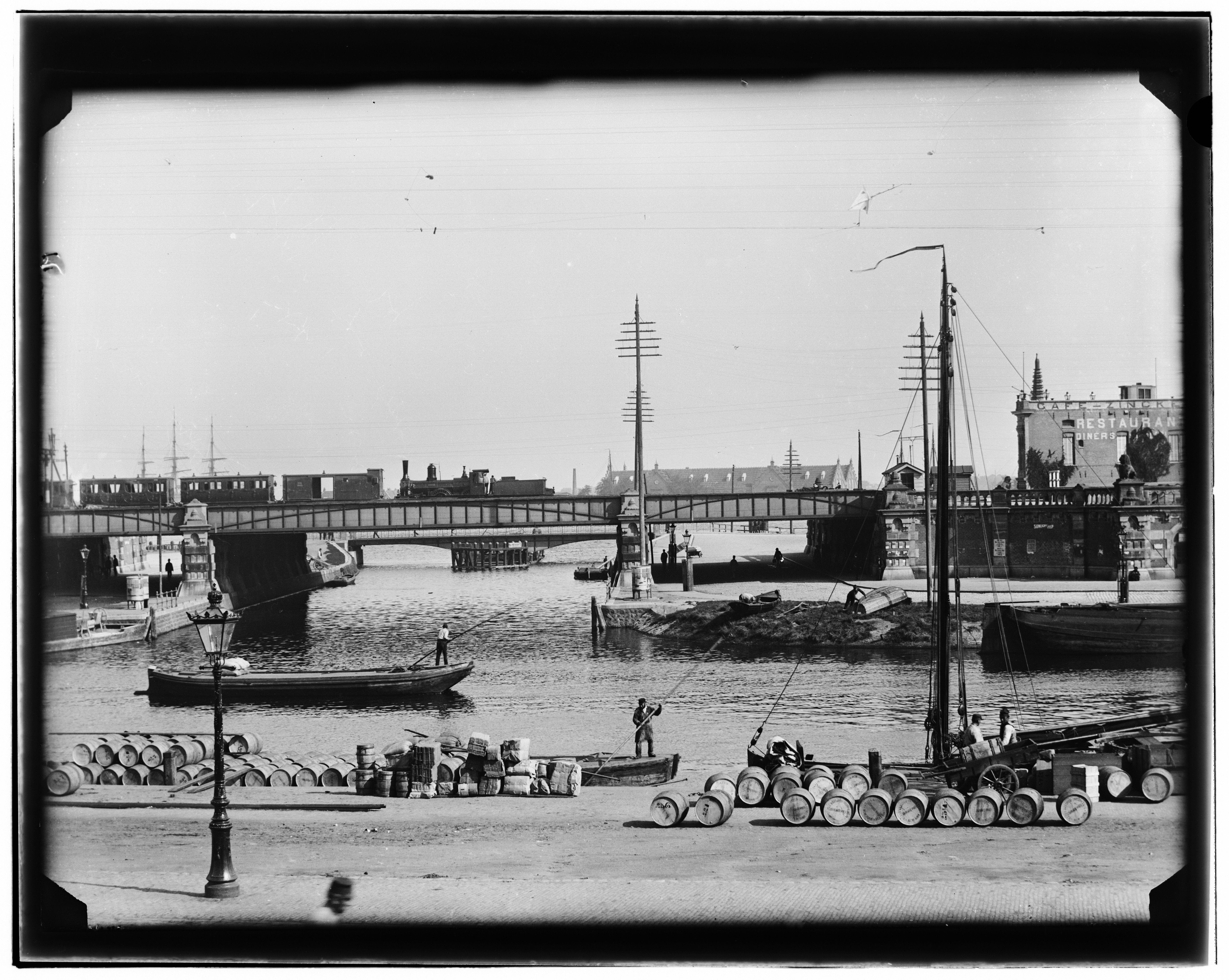 Beschrijving Open Havenfront Westertoegang met Westelijke Doorvaart``, gezien vanaf Prins Hendrikkade; brug 147 is te zien onder de spoorbrug. Documenttype foto Vervaardiger Olie``, Jacob (1834-1905) Collectie Collectie Jacob Olie Jbz. Datering 1890 Geografische naam Open Havenfront Inventarissen Afbeeldingsbestand 10019A000378 Generated with Dememorixer